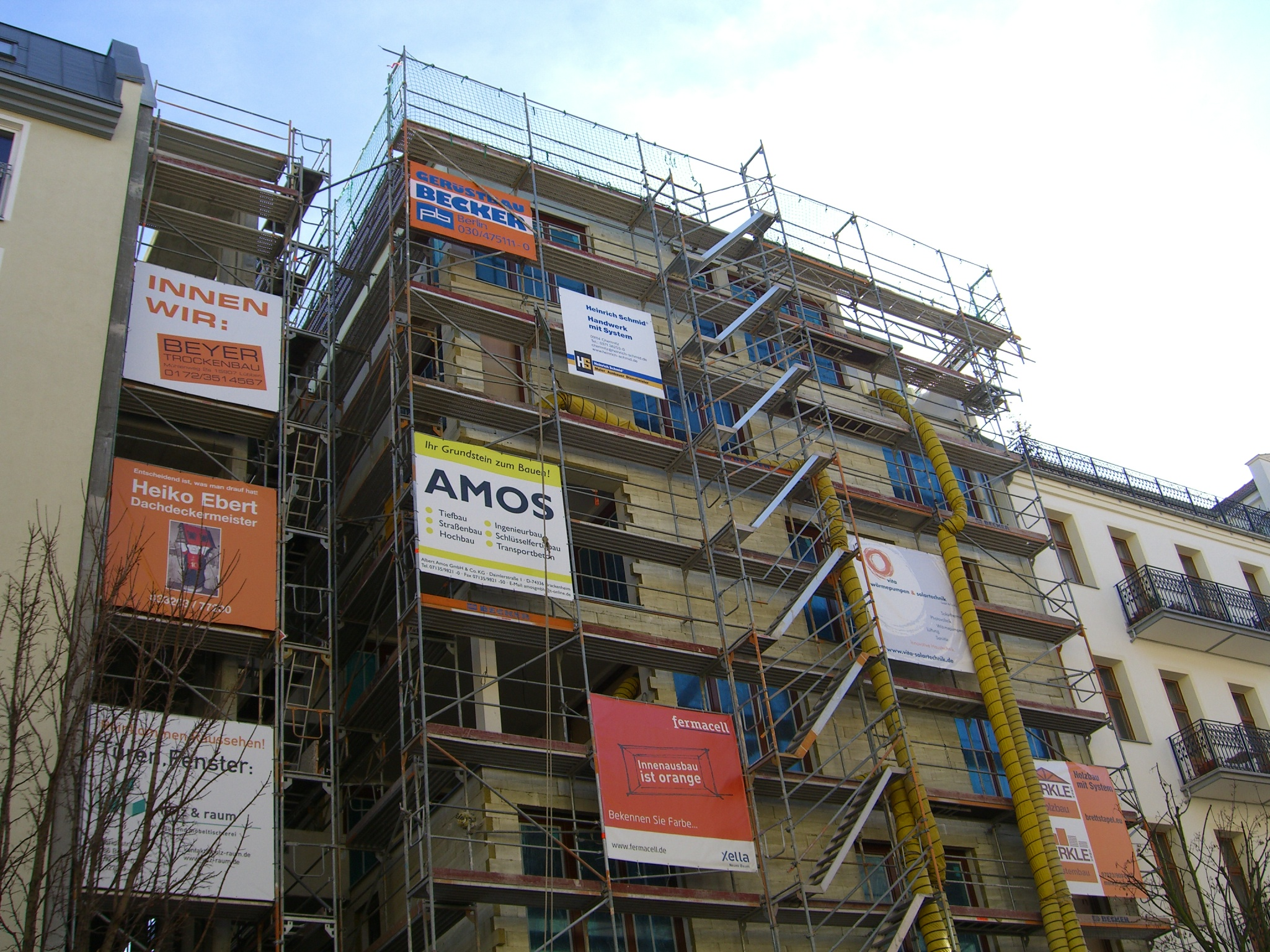 E3